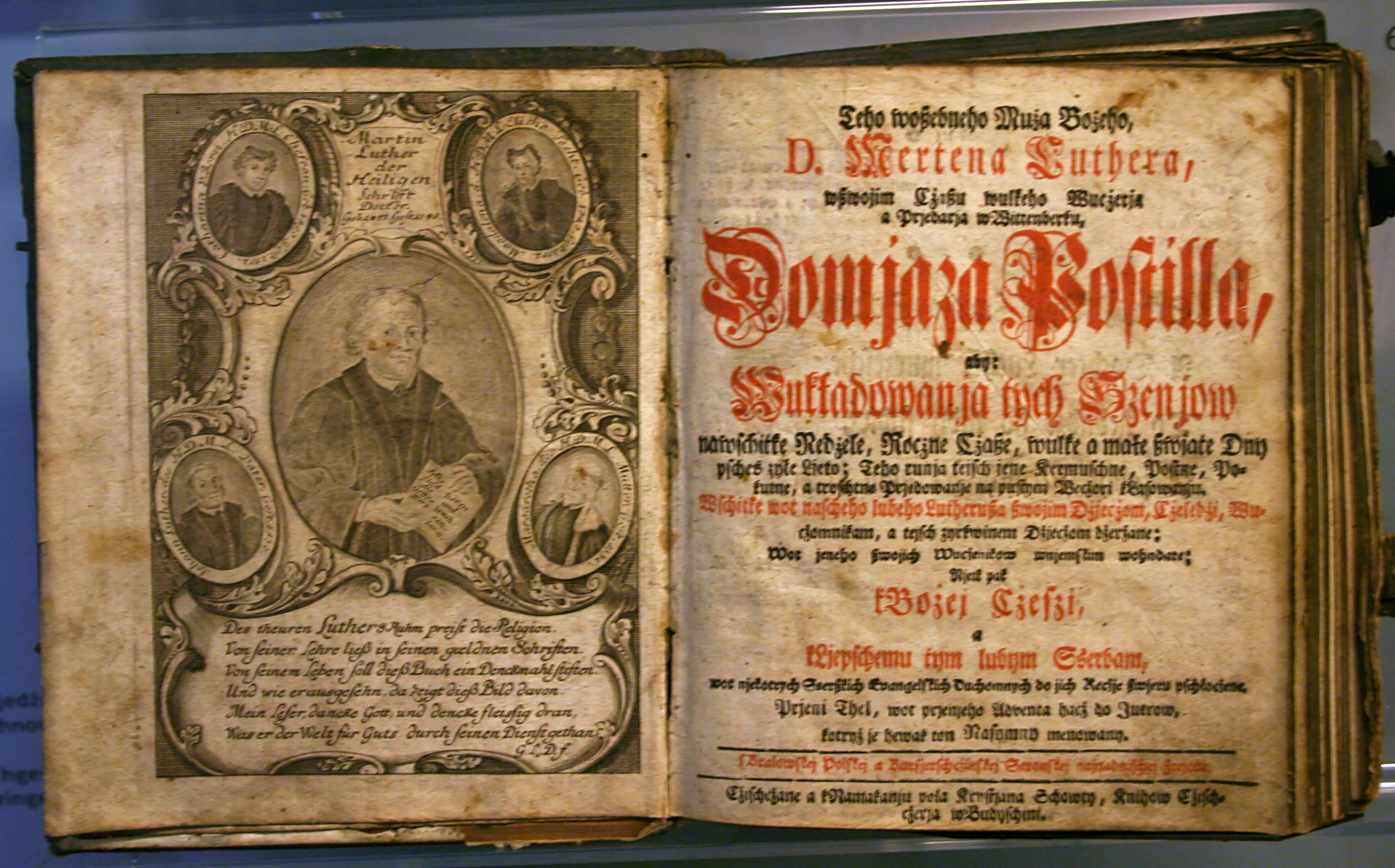 Sorbisches Museum, Bautzen, Luthers Hauspostille Hornjoserbsce: Lutherowa Domjaca postila w Budyskim Serbskim muzeju